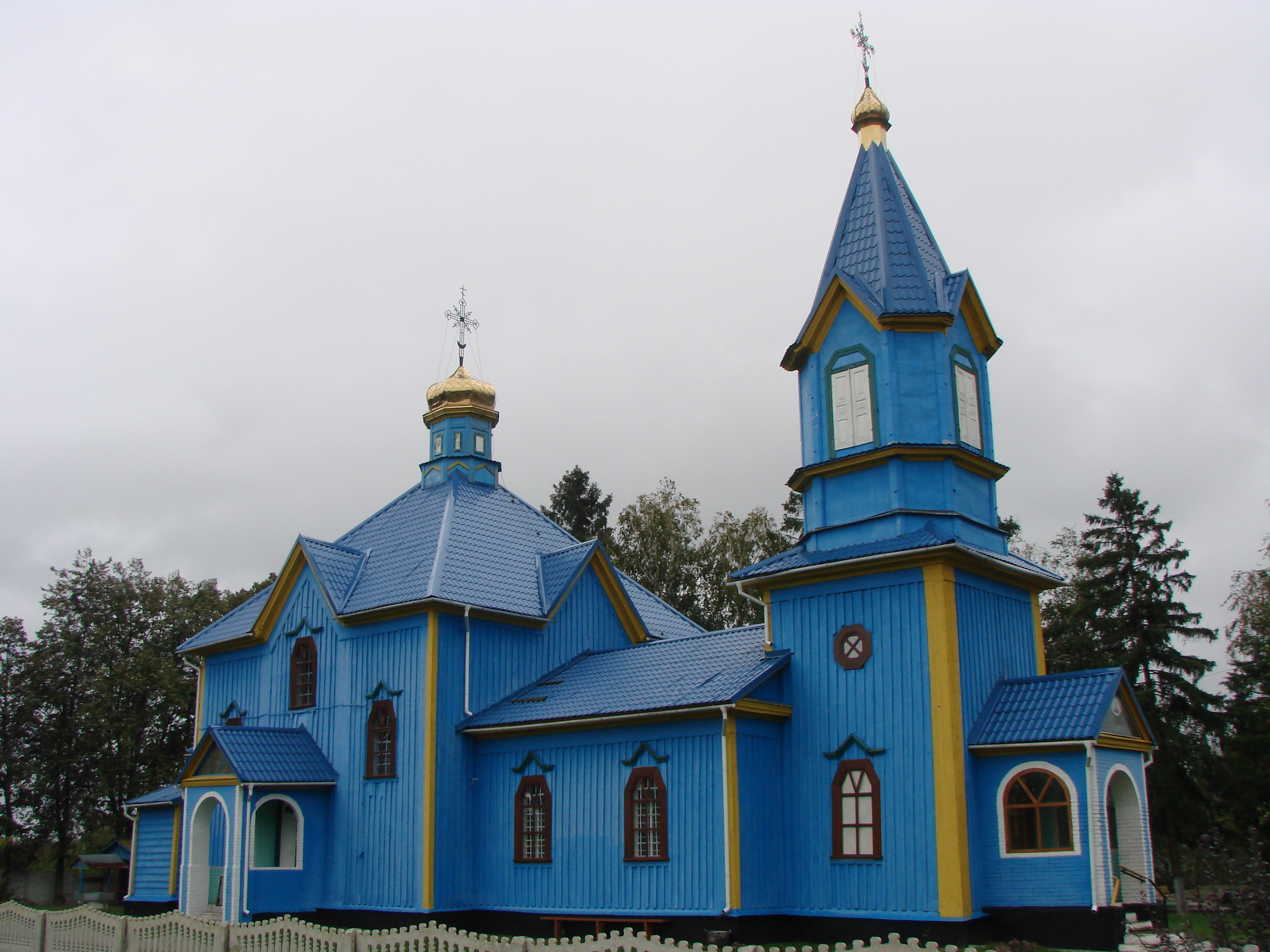 Покровська церква, с.Червона Мотовилівка